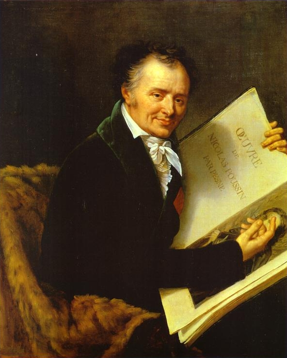 French engraver Vivant Denon (1747-1825)